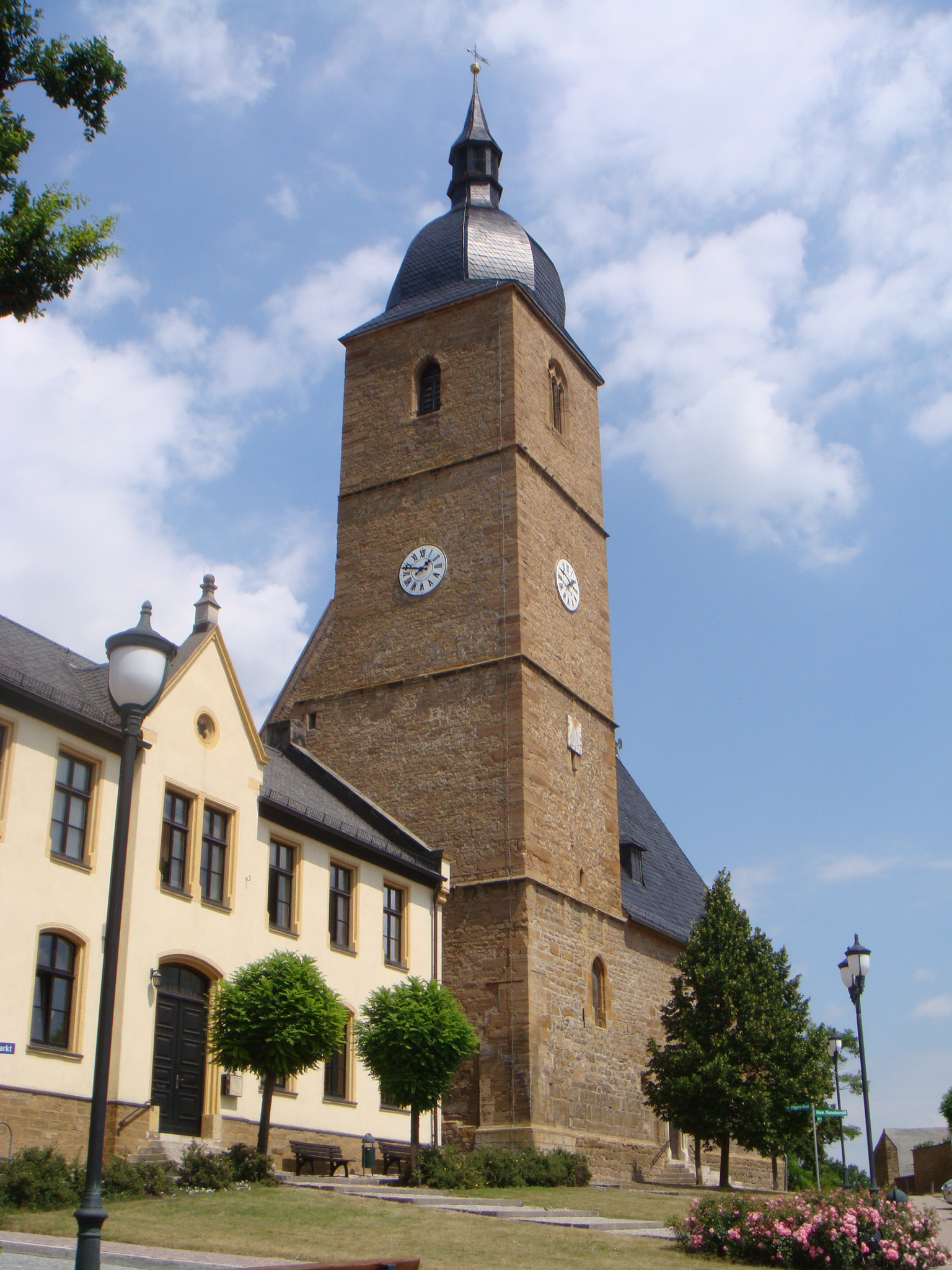 Buttelstedt, Evangelische Kirche